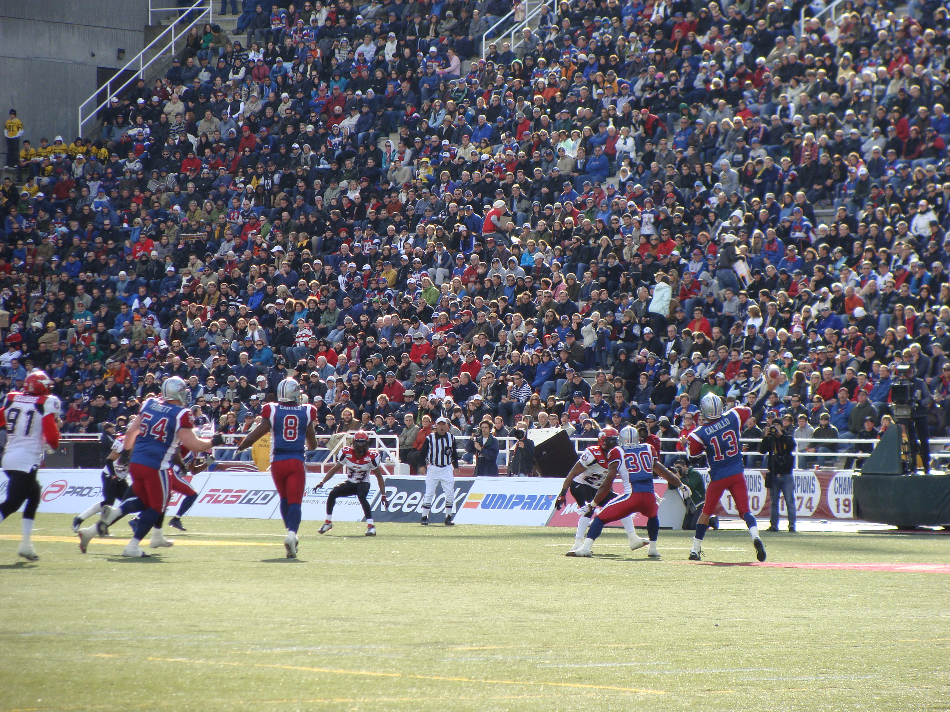 Passe de Calvillo.